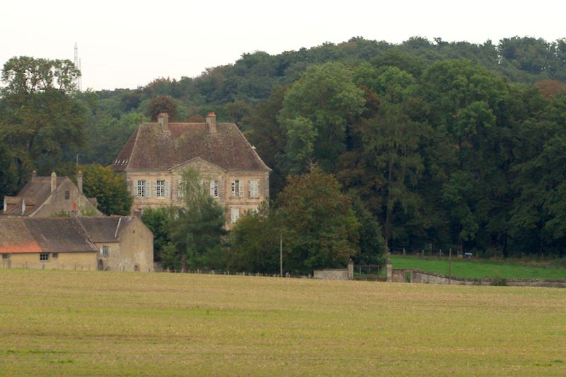 Château de Torcy (InscritClassé) .